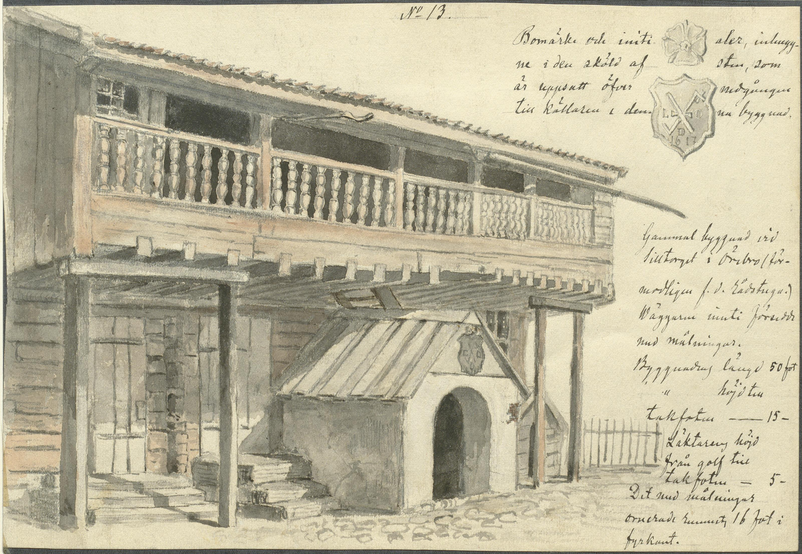 Kungsstugan avbildad vid sin ursprungliga placering vid Järntorget, (flyttad kring 1900 till sin nuvarande plats vid Lars Bohms udde i Stadsparken, senare Wadköping). Akvarellerad pennteckning. Motiv: Kungsstugan Nyckelord: Byggnadsminnen, Riksintressen Kategori: Borgargård, Akvarell Kungsstugan avbildad vid sin ursprungliga placering vid Järntorget, (flyttad kring 1900 till sin nuvarande plats vid Lars Bohms udde i Stadsparken, senare Wadköping). Akvarellerad pennteckning.